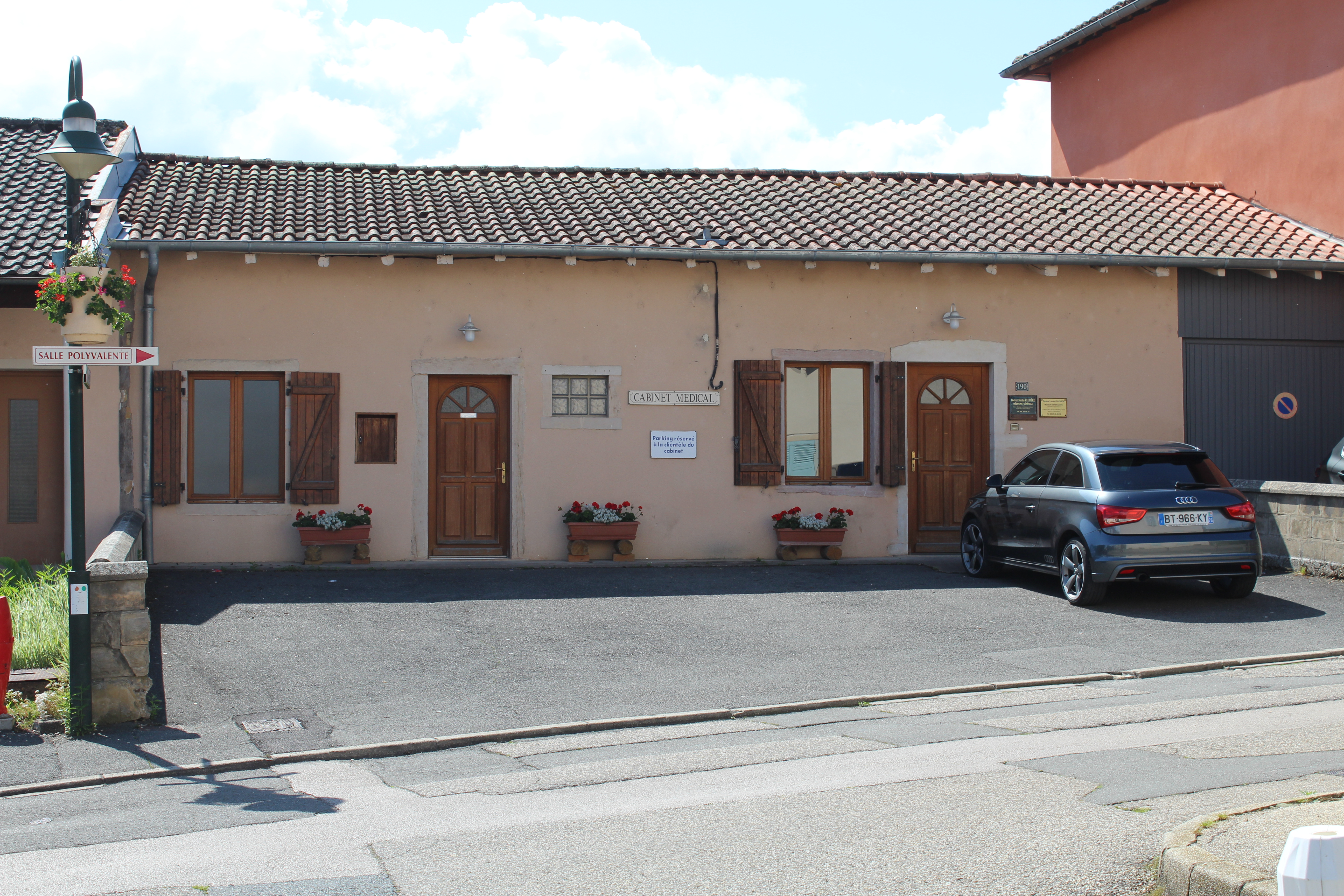 Cabinet médical de Saint-Cyr-sur-Menthon.